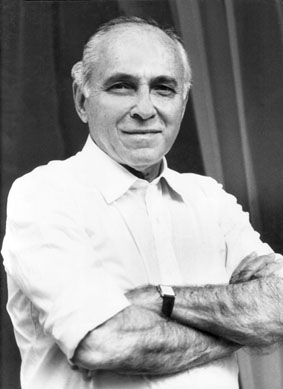 Arquivo pessoal de Israel Dias Novaes